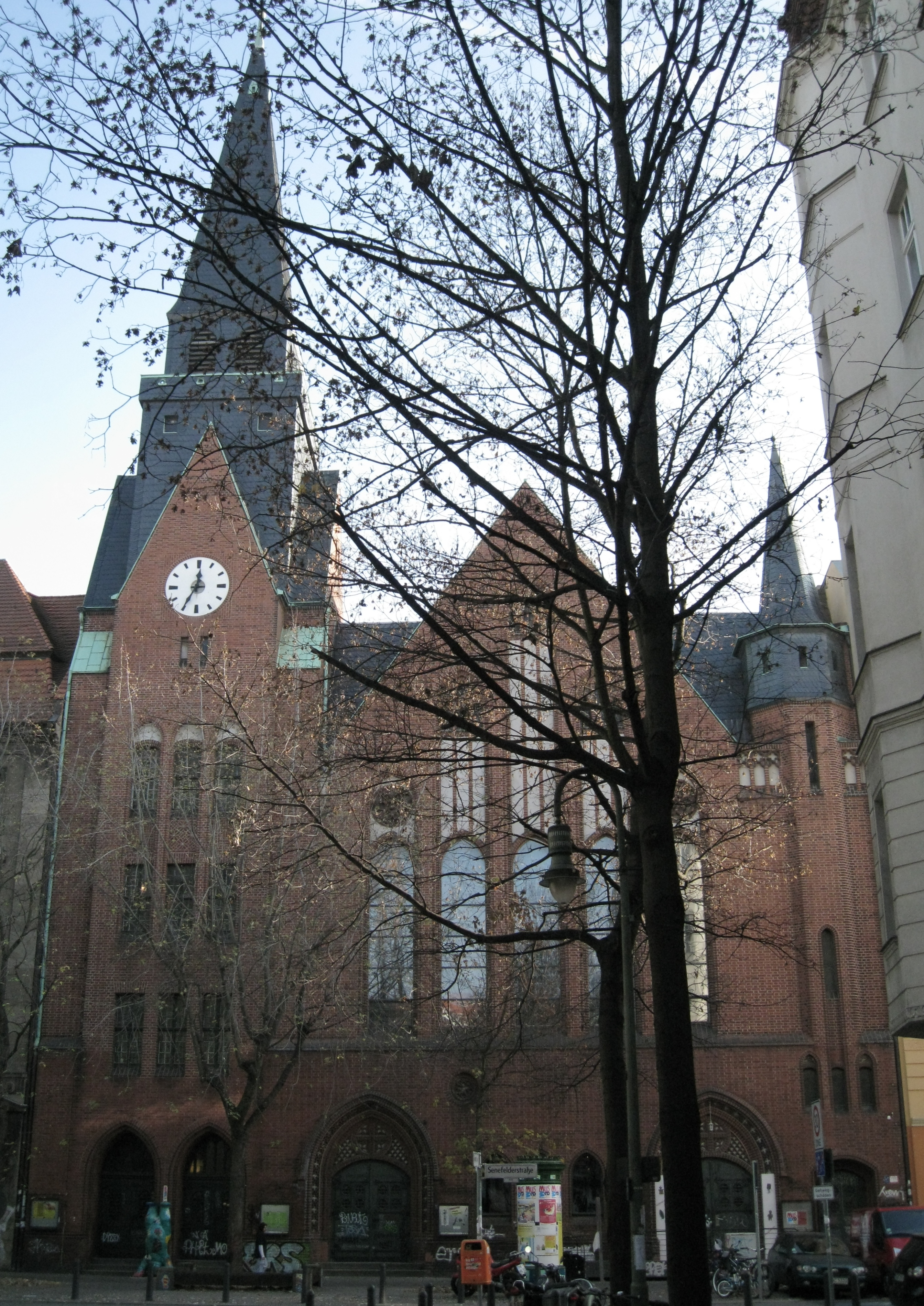 Straßenfront der Eliaskirche